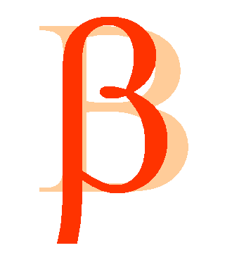 Greek letter